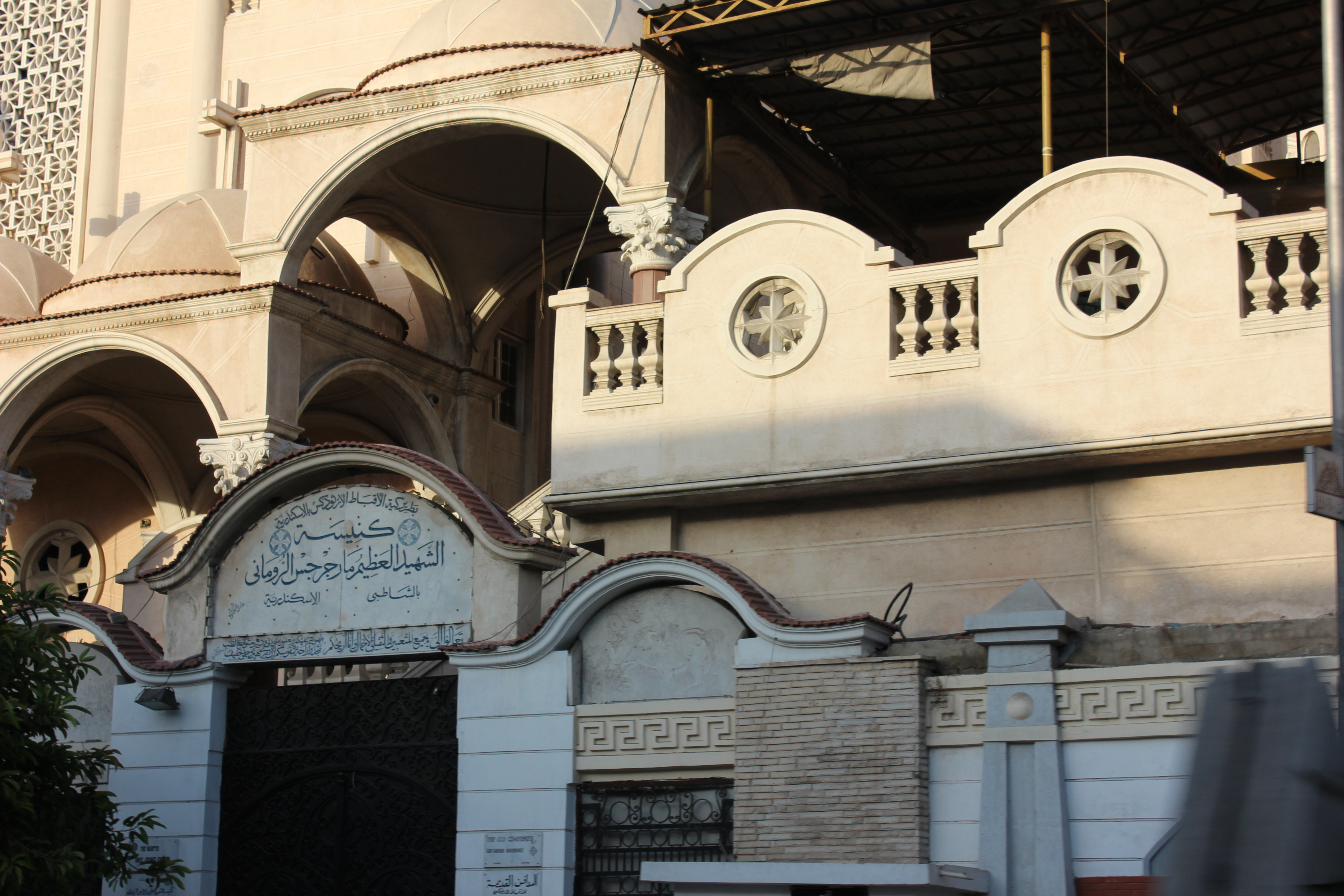 مباني الإسكندرية وبعض العلامات المميزة.